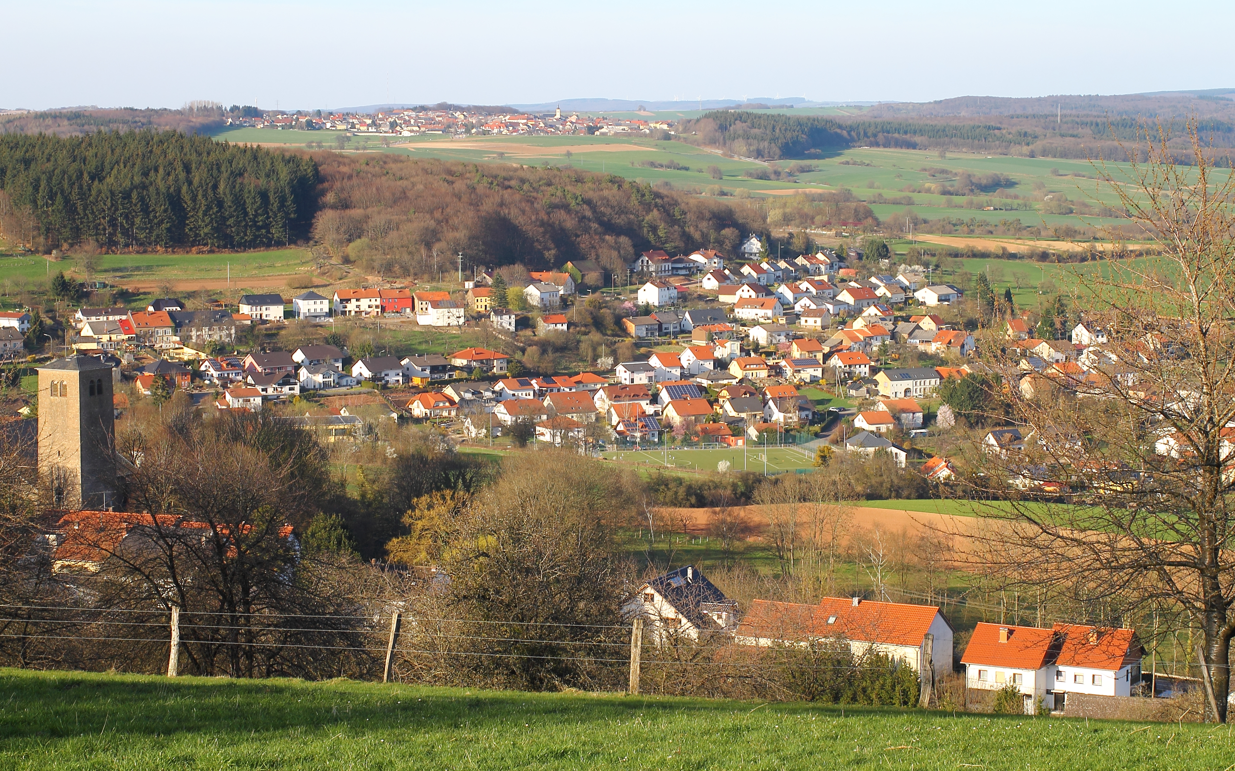 Tünsdorf - Blick vom Kewelsberg aus westlicher Richtung